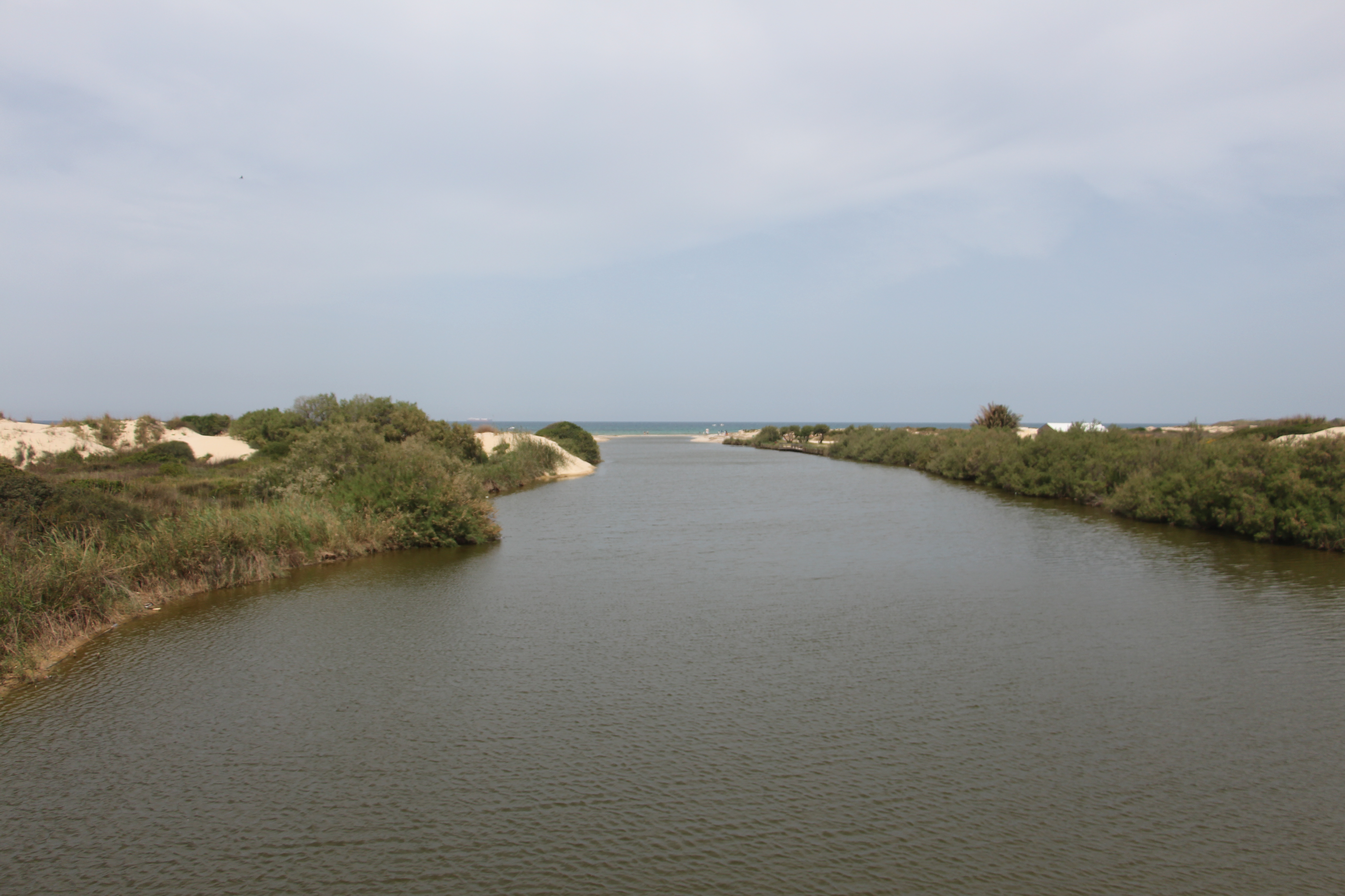 נחל אלכסנדר בהשפכו לים התיכון בחוף "בית ינאי" שבארץ ישראל